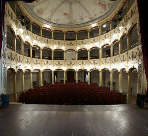 Teatro comunale di Santa Franca (già dei Filodrammatici)